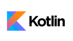 Uradni logotip Kotlina.